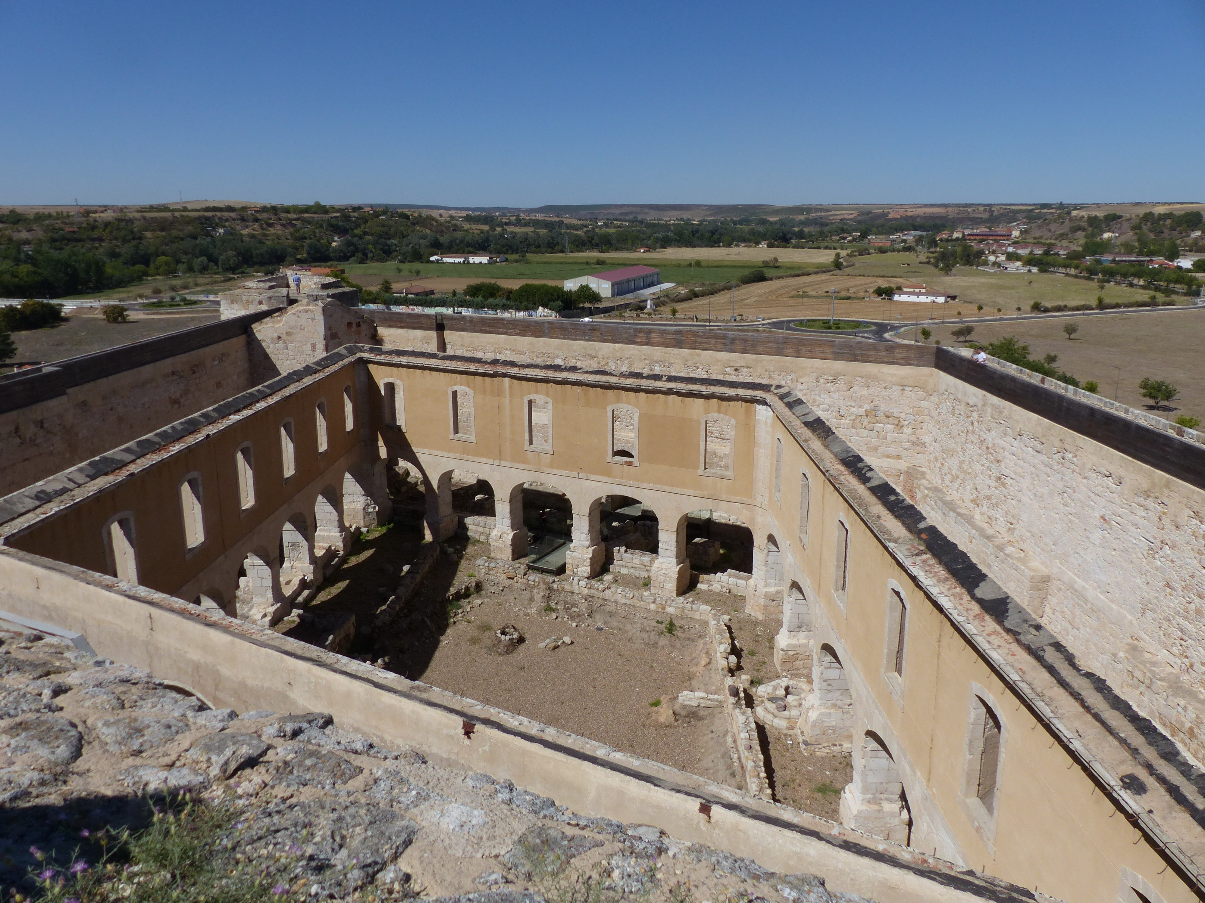 Interior del castillo de Zamora, España